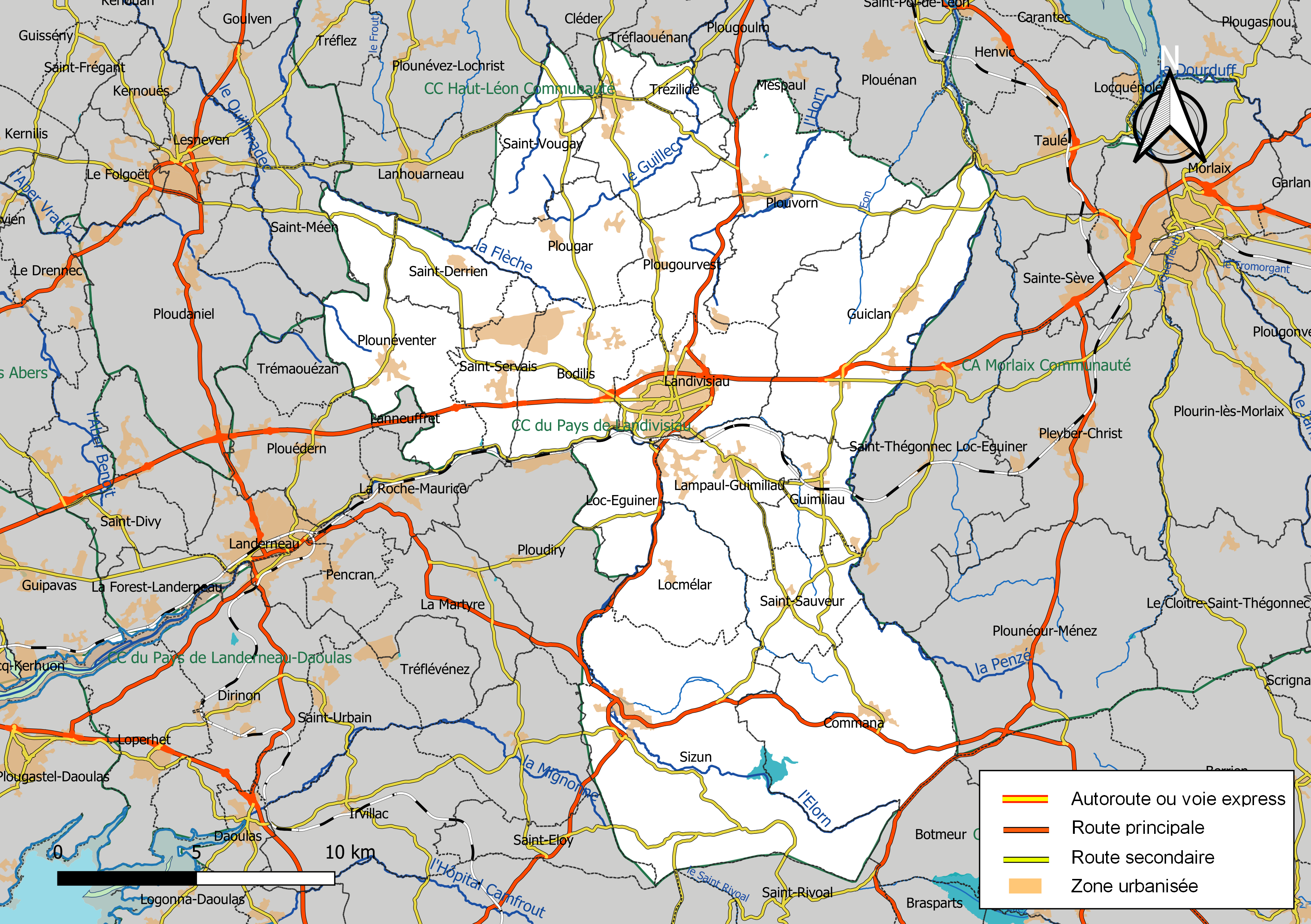 Carte géographique de la Communauté de communes du Pays de Landivisiau, département du Finistère, France. Composition au 1er janvier 2019.